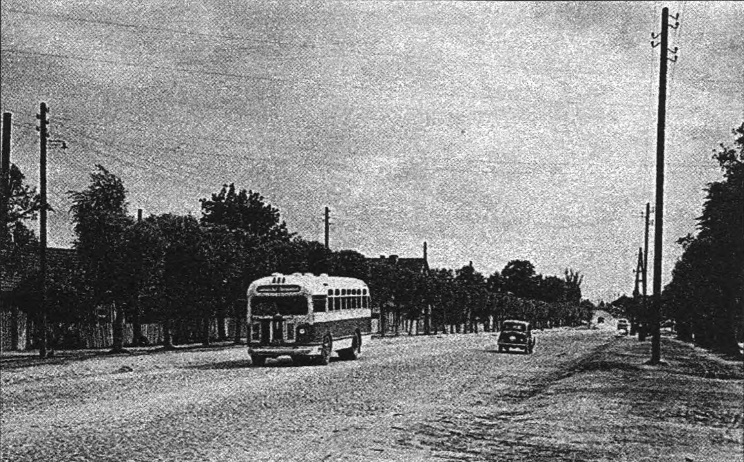 Беларуская (тарашкевіца): Менск (Miensk), Серабранскія Млыны (Sierabranskija Młyny), тракт Ігуменскі (trakt Ihumienski)